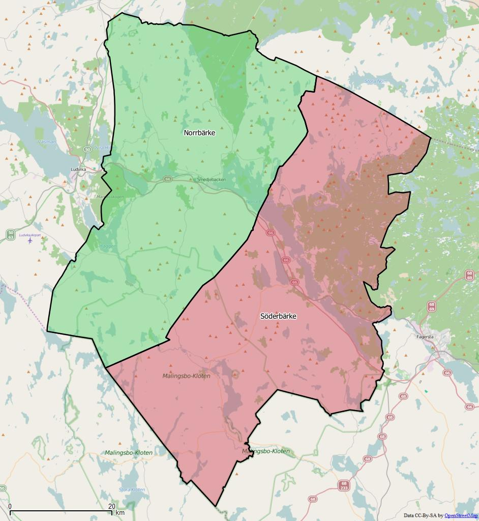 Distriktsindelningen i Smedjebackens kommun World file: 99.52051439162394786 0 0 -99.52051439162394786 1674671.59205640759319067 8466292.06146825104951859